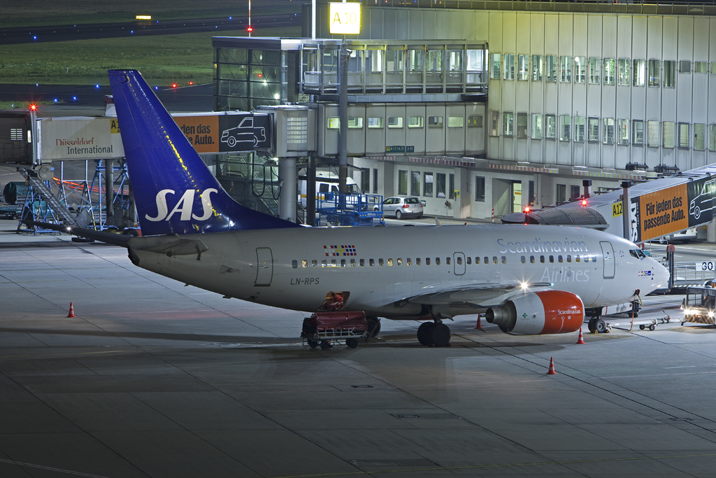 LN-RPS B737 SAS